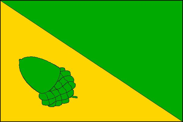 Vlajka obce Zborovice